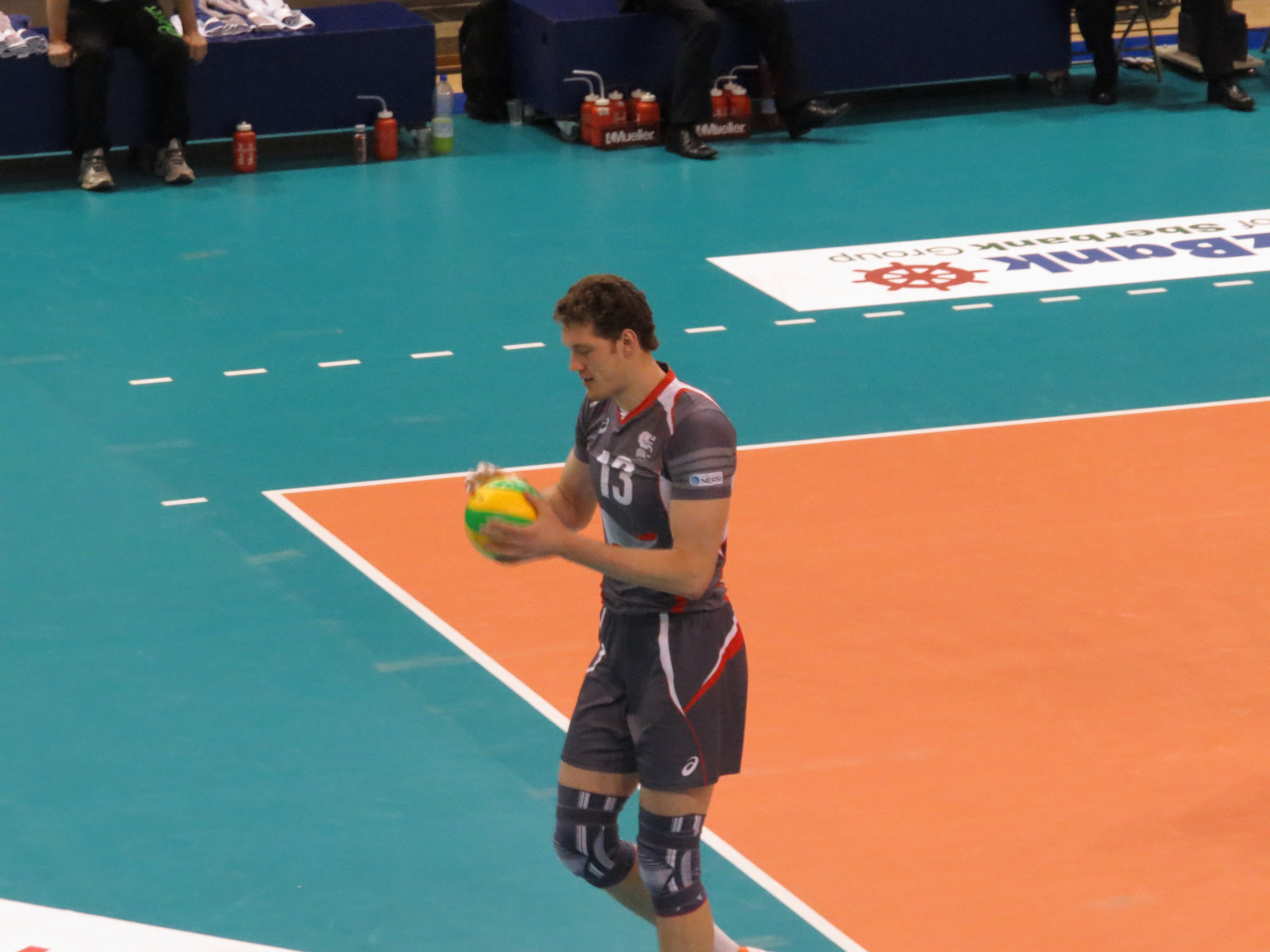 Photo réalisée lors du match de ligue des champions de volley entre le Paris Volley et le Lokomotiv Belgorod. Victoire de Belgorod 3-0 13 MUSERSKIY Dmitriy